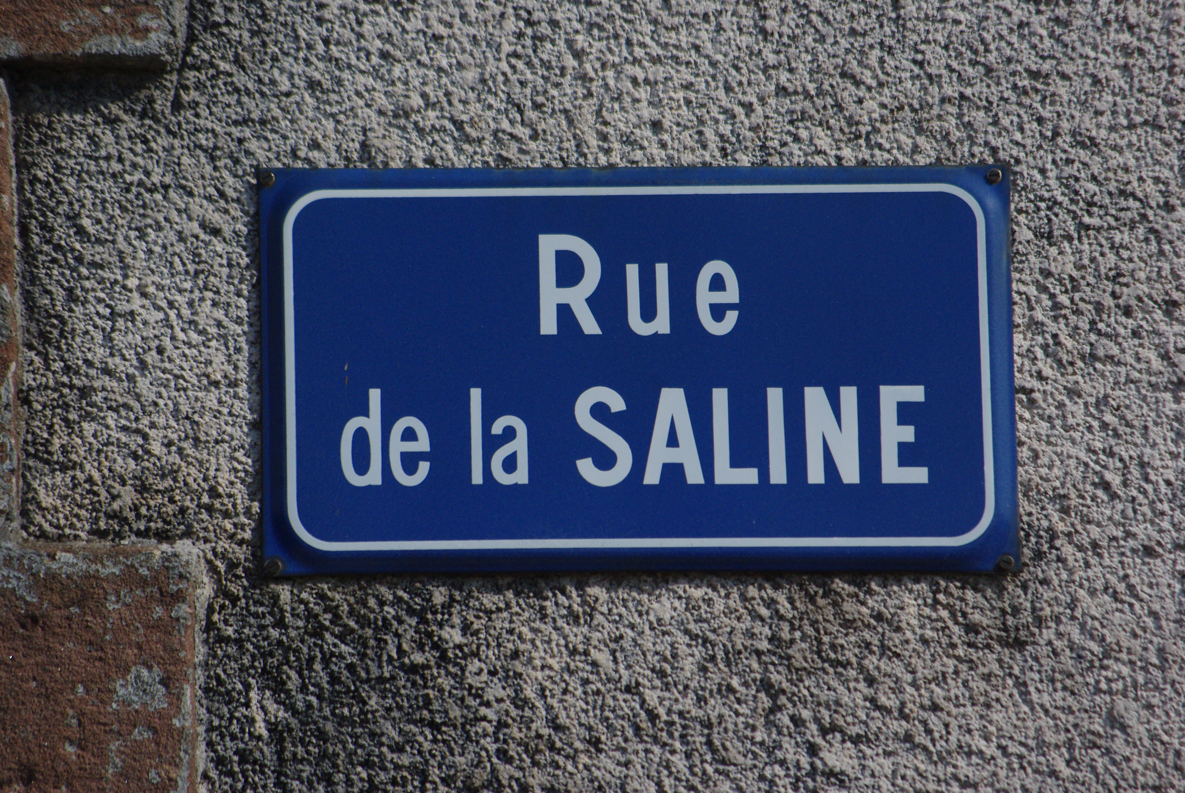 Plaque de rue du quartier St-Blaise de Moyenmoutier, vestige mémoriel de l'antique voie des Saulniers